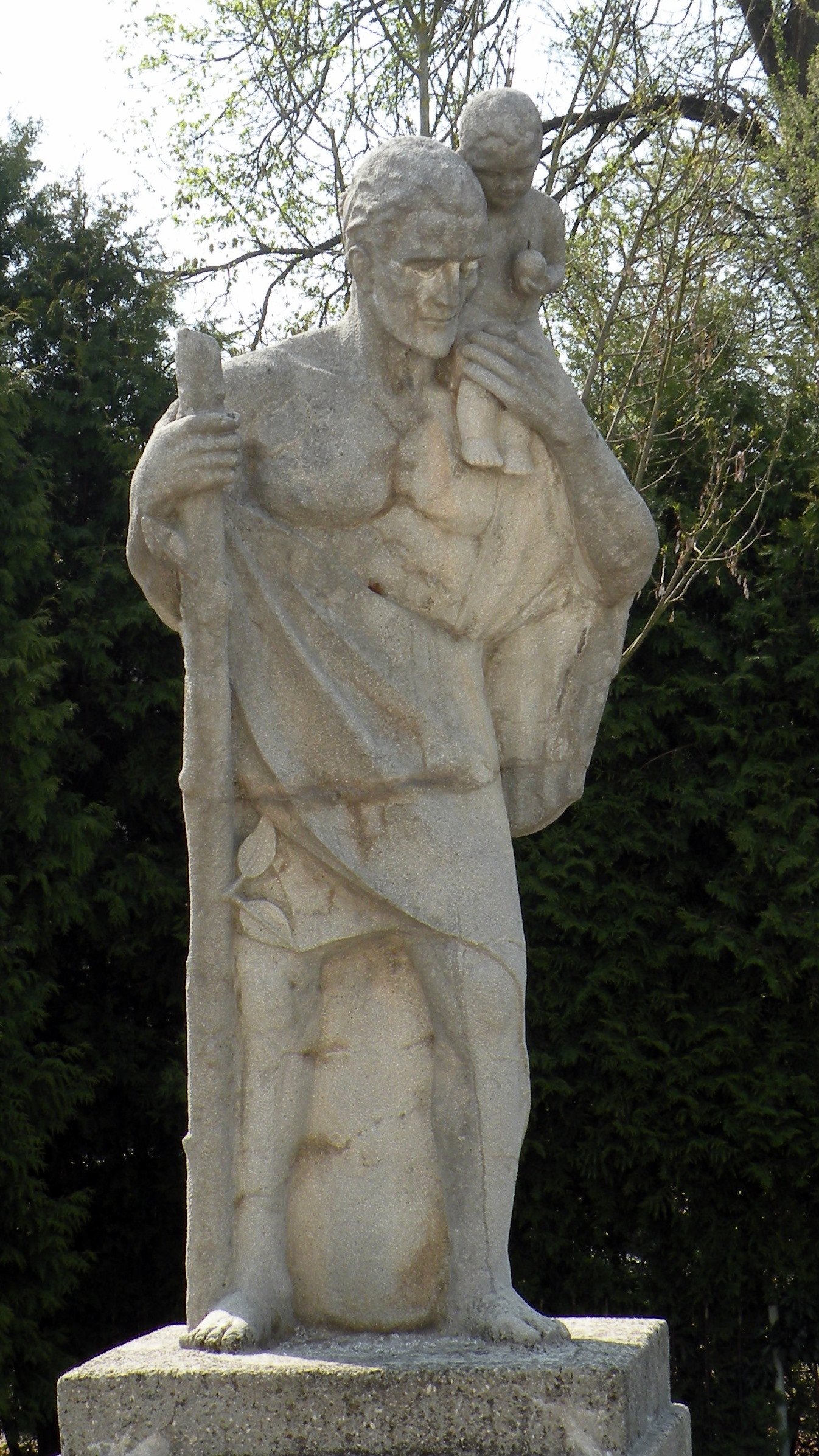 Christophorus Statue in Perg an der Naarnbrücke